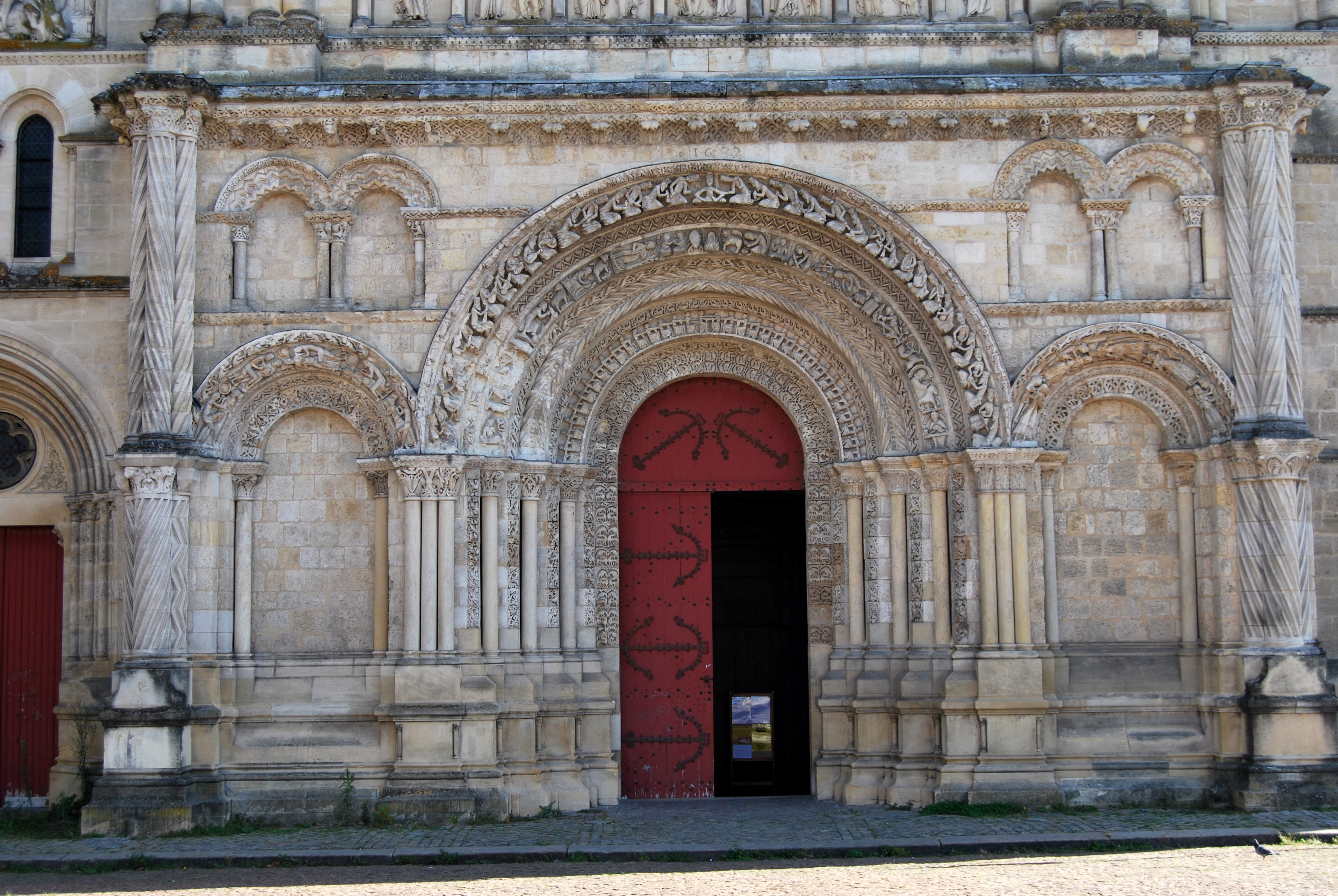 Bordeaux Ste-Croix façade ouest